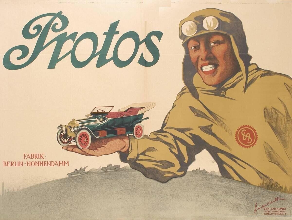 Hans Lindenstaedt: Protos. Fabrik: Berlin-Nonnendamm. Plakat, 72 cm x 95 cm